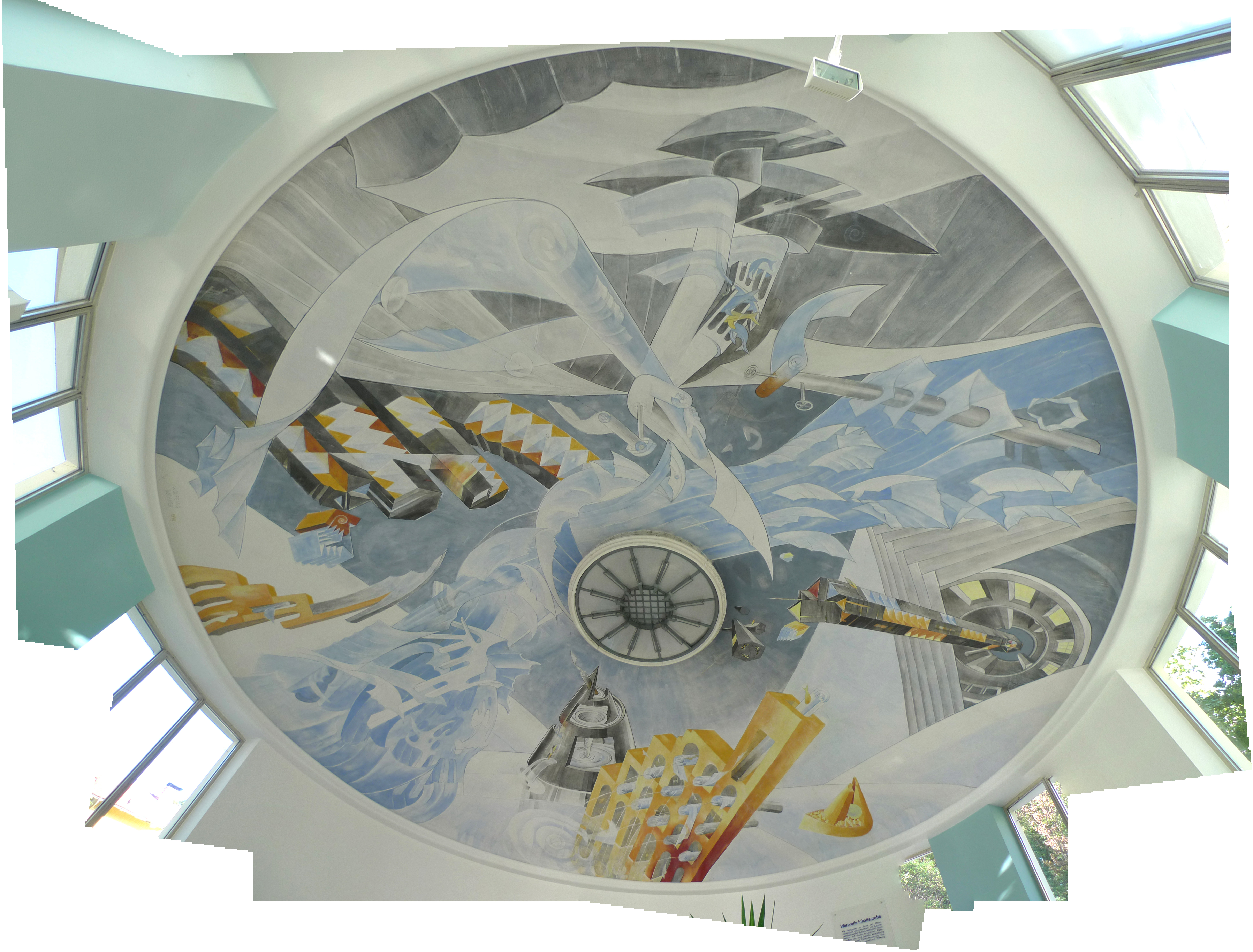 Brunnenhaus beim Kurmittelhaus, Deckengemälde von Wolfgang Buchner